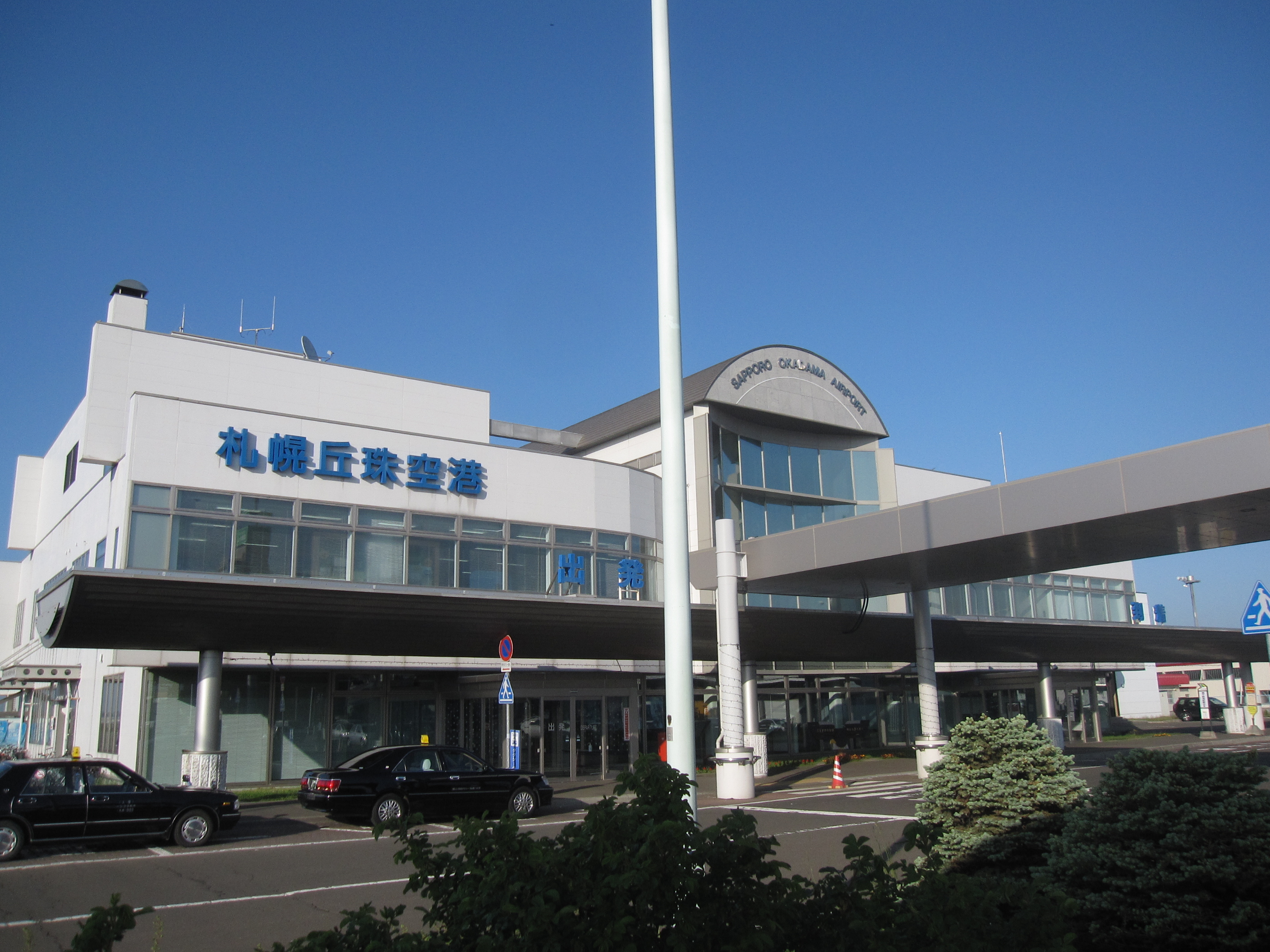 札幌丘珠空港 Okadama airport